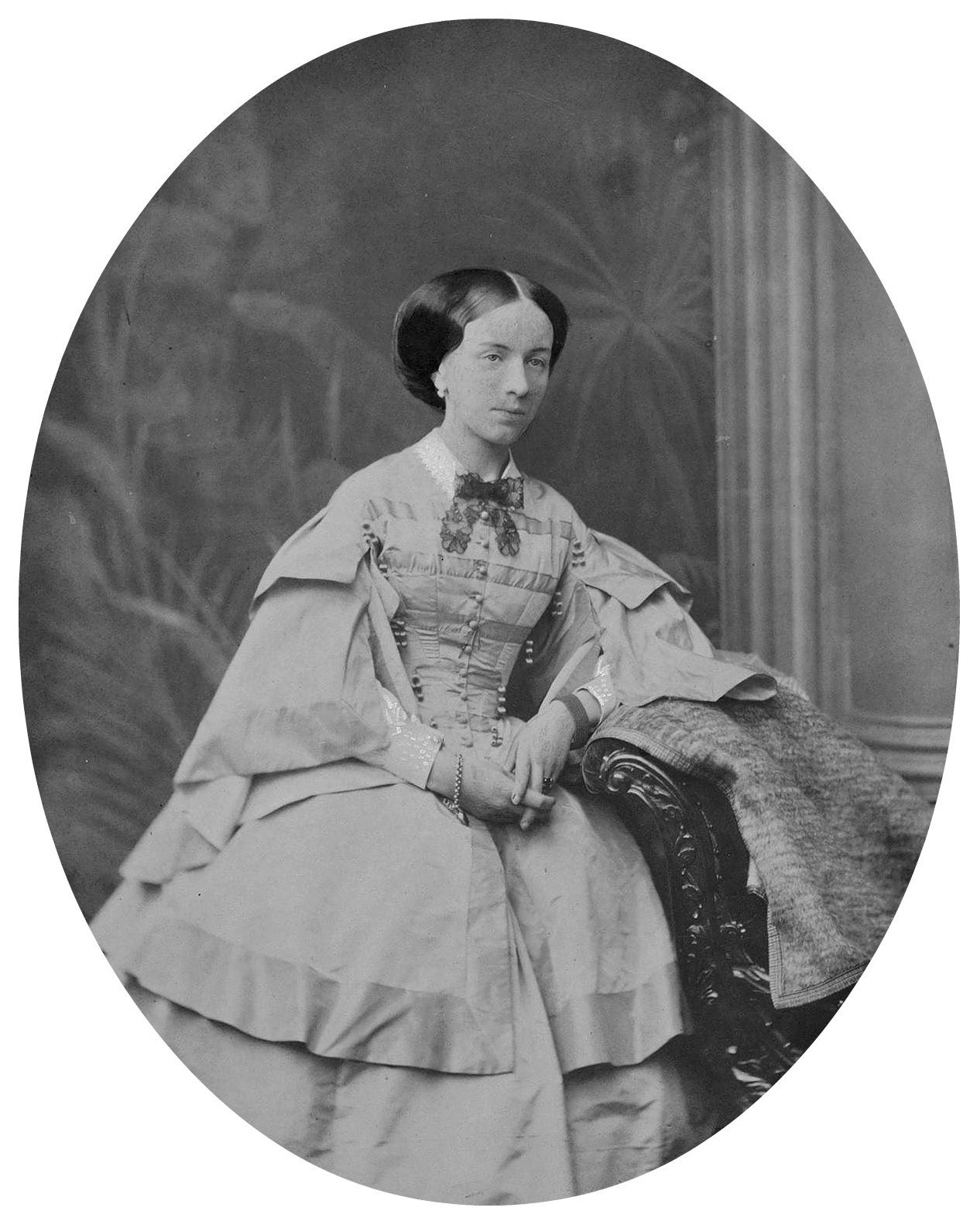 Баронесса Елена Фёдоровна Оффенберг (1834— ?), в браке с бароном Иоганном фон Кеннериц, саксонским посланником в России